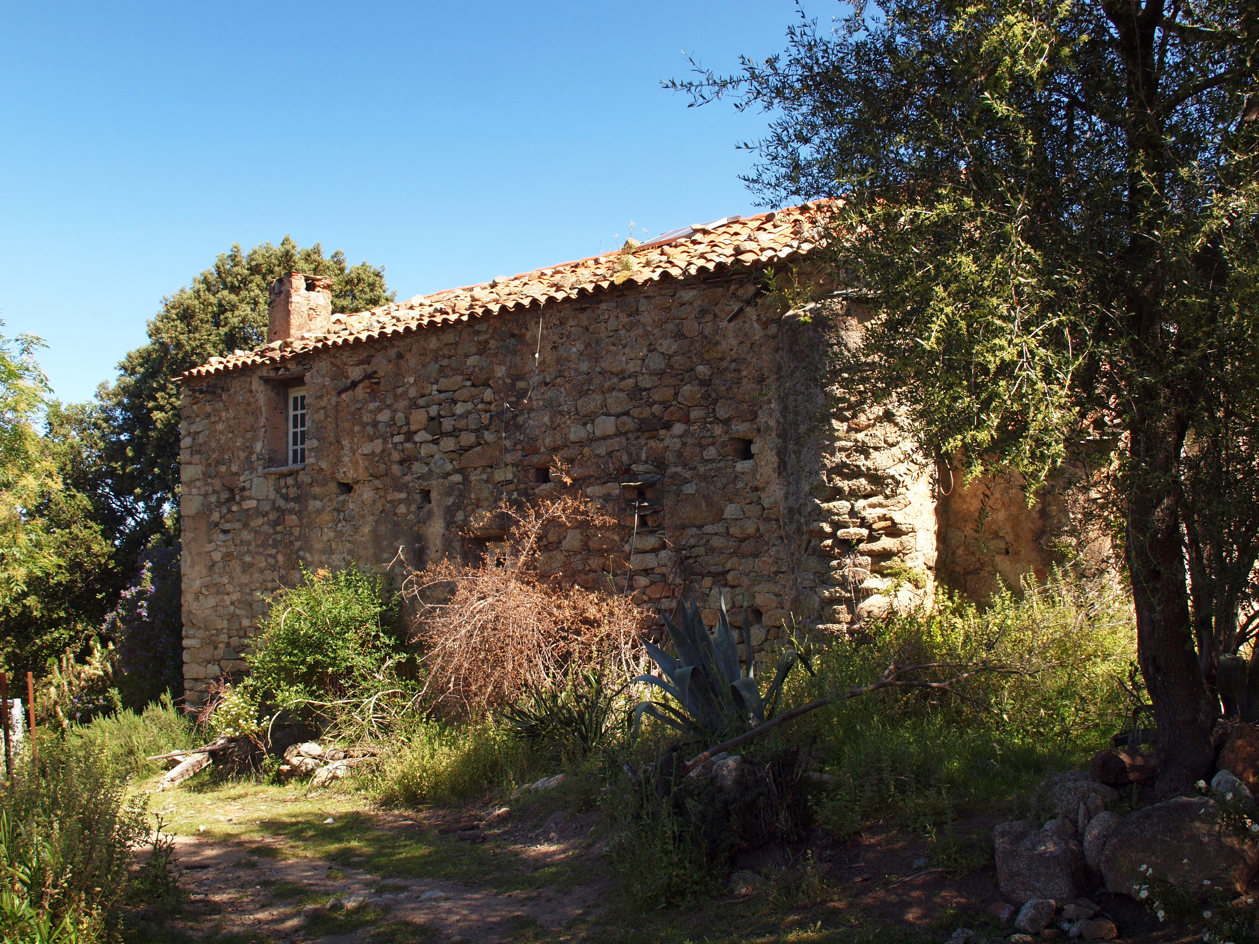 Lama, Paesi d'Ostriconi (Corse) - Ancienne chapelle San Lorenzo, façade sud, classée MH